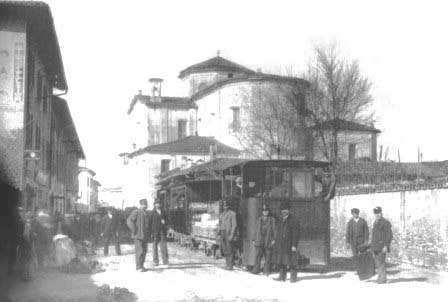 Seriate, fermata tram